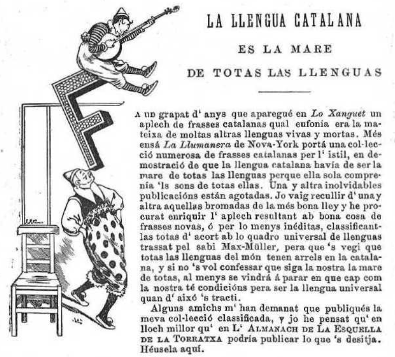 Text històric del joc "El català, mare de totes les llengües"